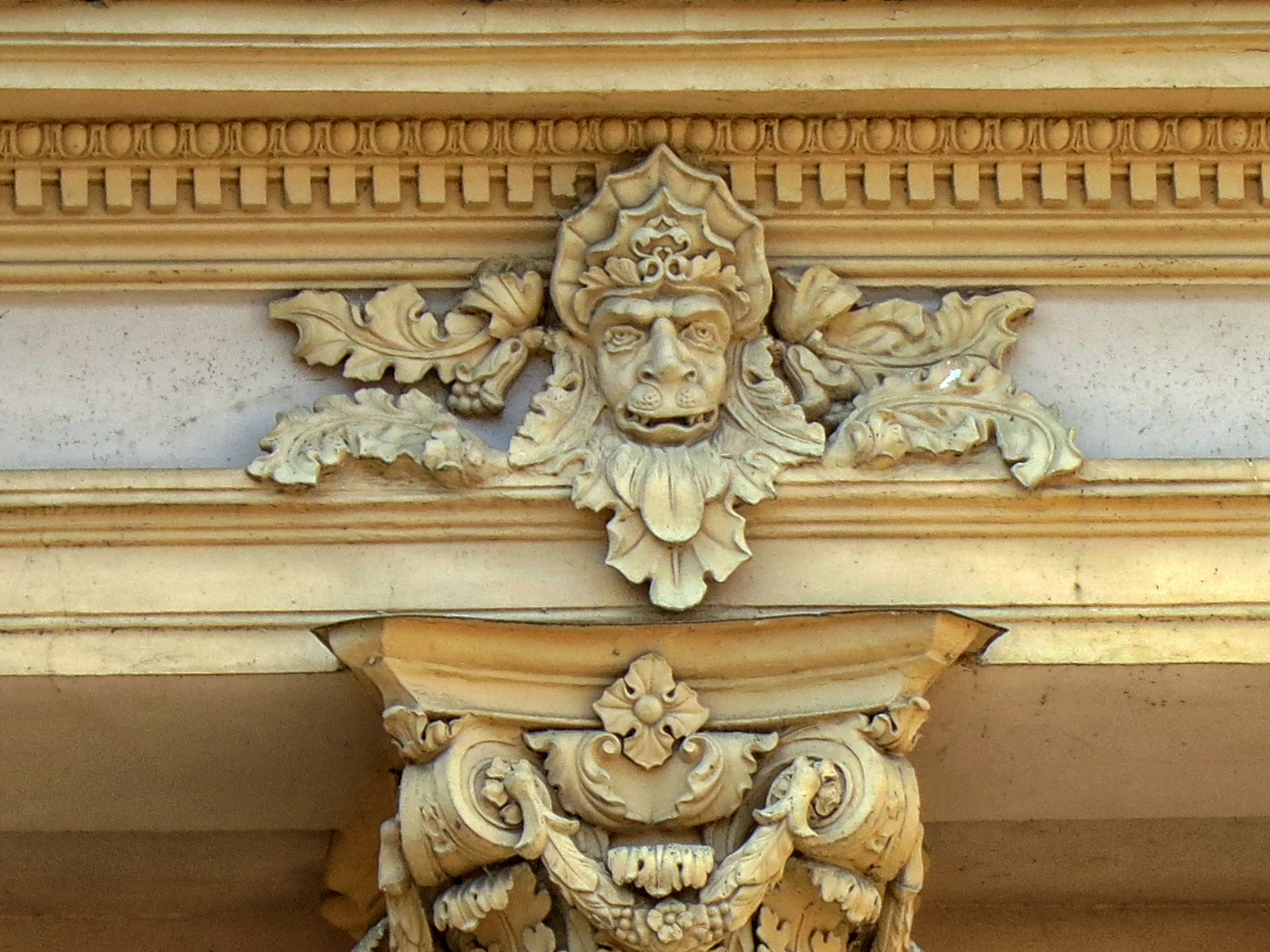 Дворец Алфераки С.Н. (Коммерческое собрание), здание музея: улица Фрунзе, 41 / улица Глушко, 13, Таганрог, Ростовская область